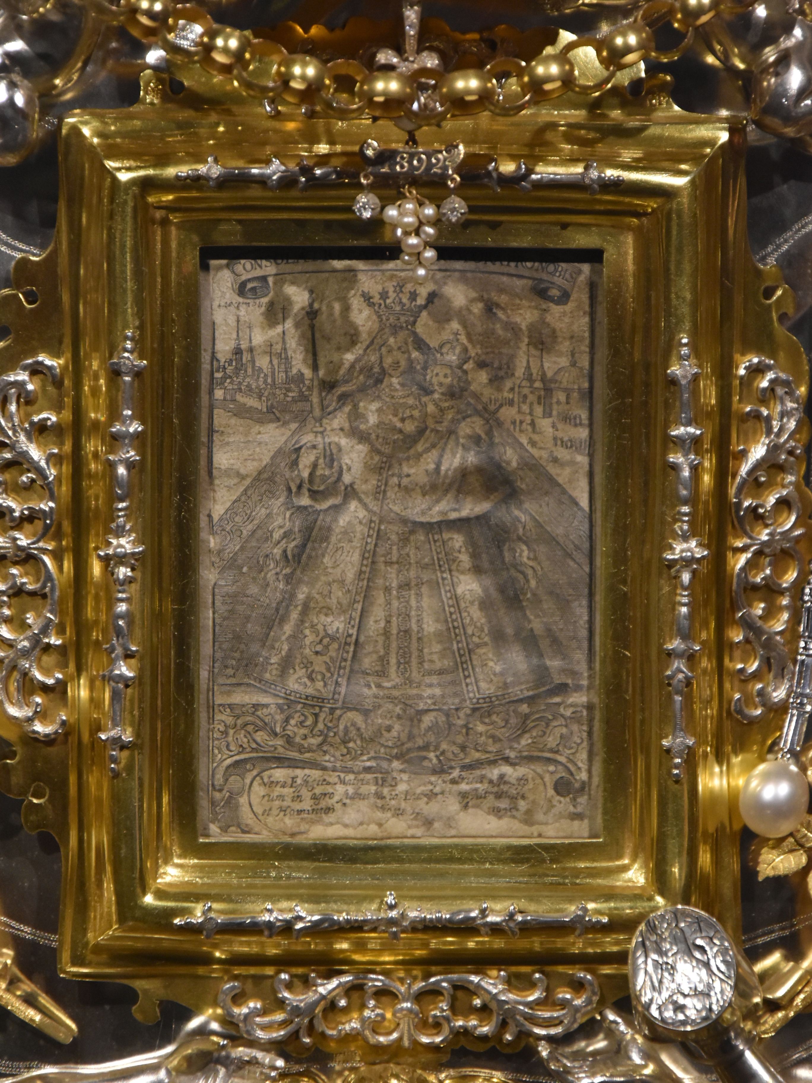 Genadekapel met Genadebeeld Kevelaer 24-04-2019 11-44-21